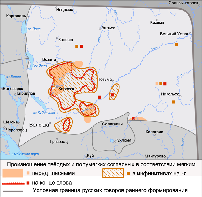 Карта распространения твёрдых и полумягких согласных в соответствии мягким в вологодских говорах. Источники: Захарова К. Ф., Орлова В. Г., Сологуб А. И., Строганова Т. Ю. Образование севернорусского наречия и среднерусских говоров / Ответственный редактор В. Г. Орлова. — М.: «Наука», 1970. — С. 271 (Карта 81.Произношение твёрдых и полумягких согласных в соответствии мягким в разном положении в слове)